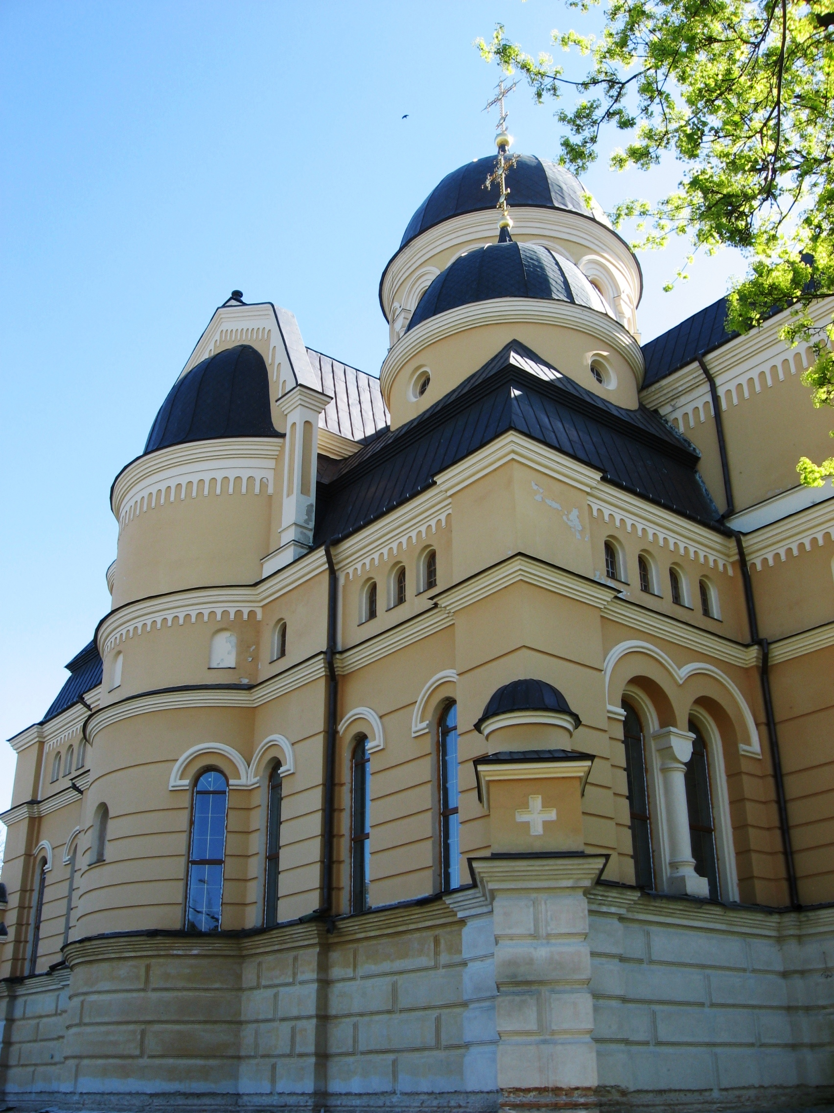 Свято-Троїцький собор у Берестечку